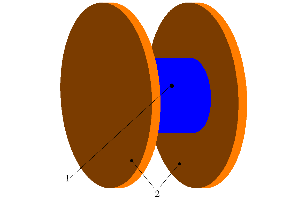 drum reel